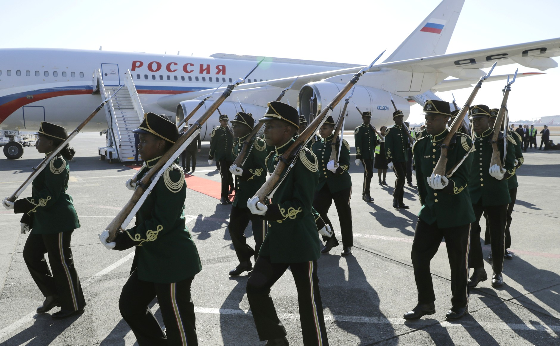 Владимир Путин прибыл в ЮАР для участия в Десятом саммите БРИКС.